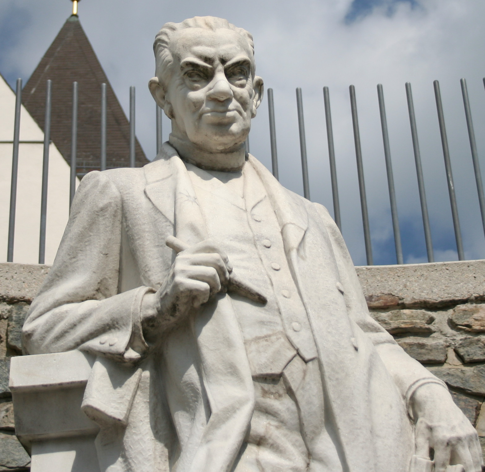 Statue des Dichters Ottokar Kernstock im Ortskern von Vorau, Österreich.